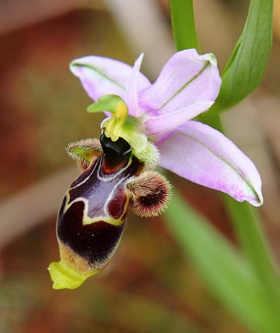 Erva passarinho